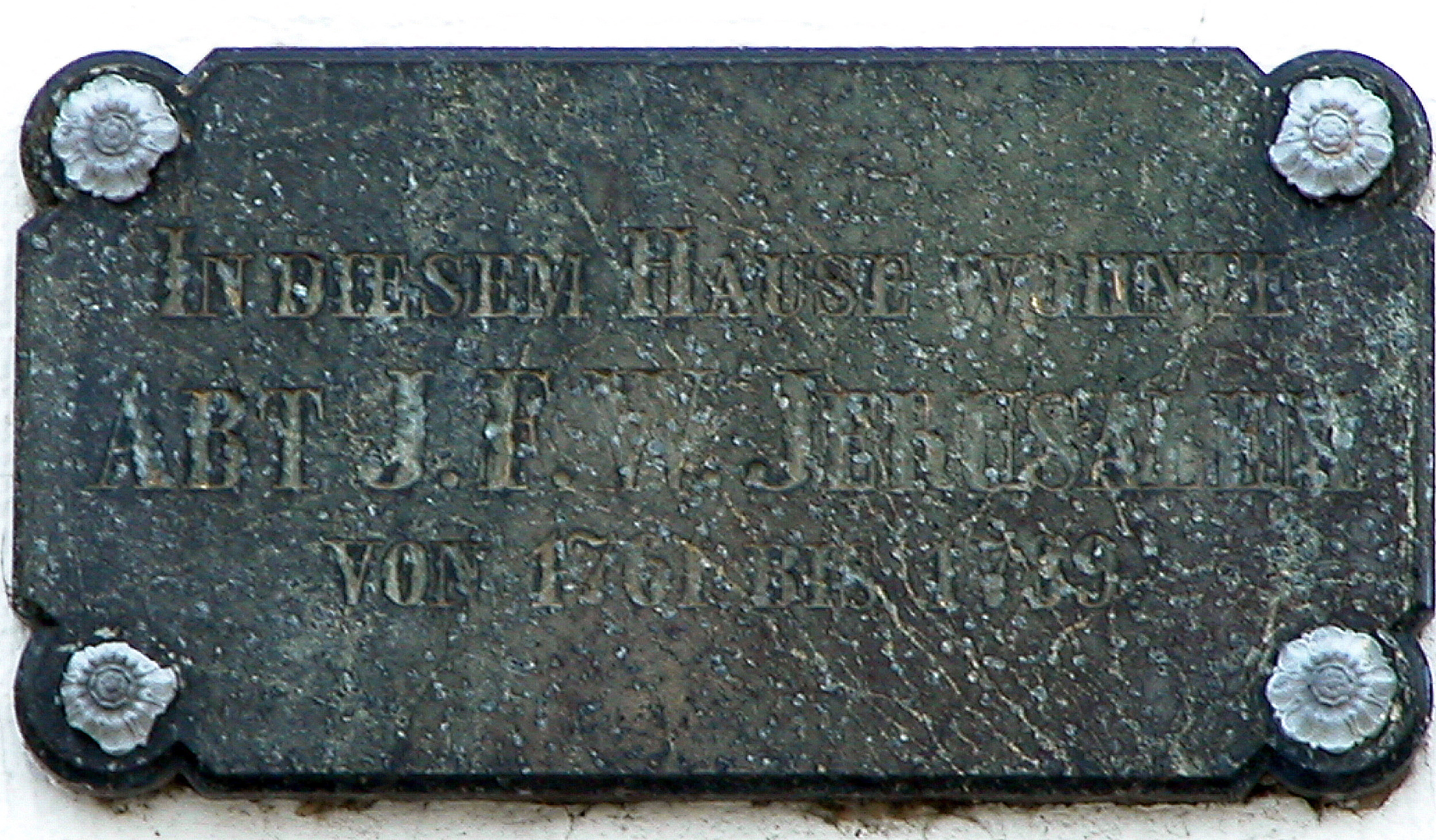 Braunschweig, Steinstraße 3: Gedenkplakette von 1895 zur Erinnerung an Johann Friedrich Wilhelm Jerusalem, der in diesem Hause von 1761 bis zu seinem Tode 1789 lebte.